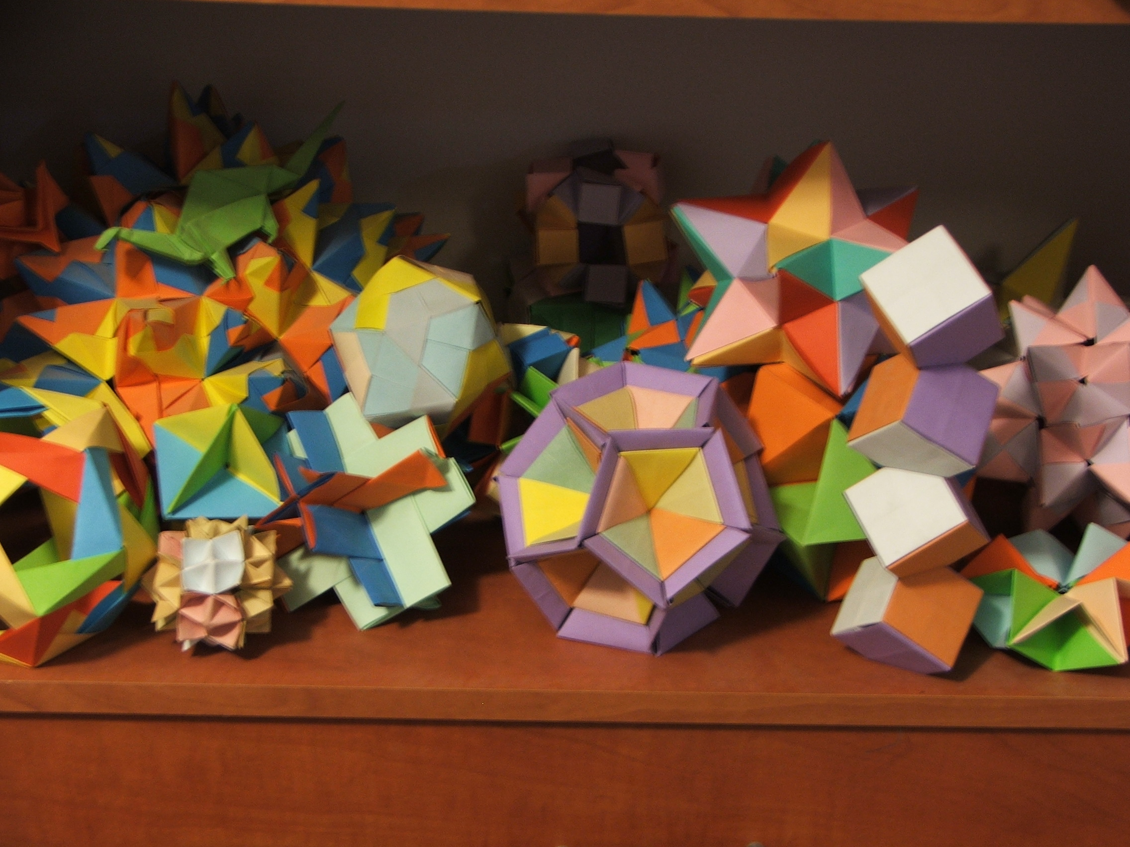 אוריגמי מודולרי.